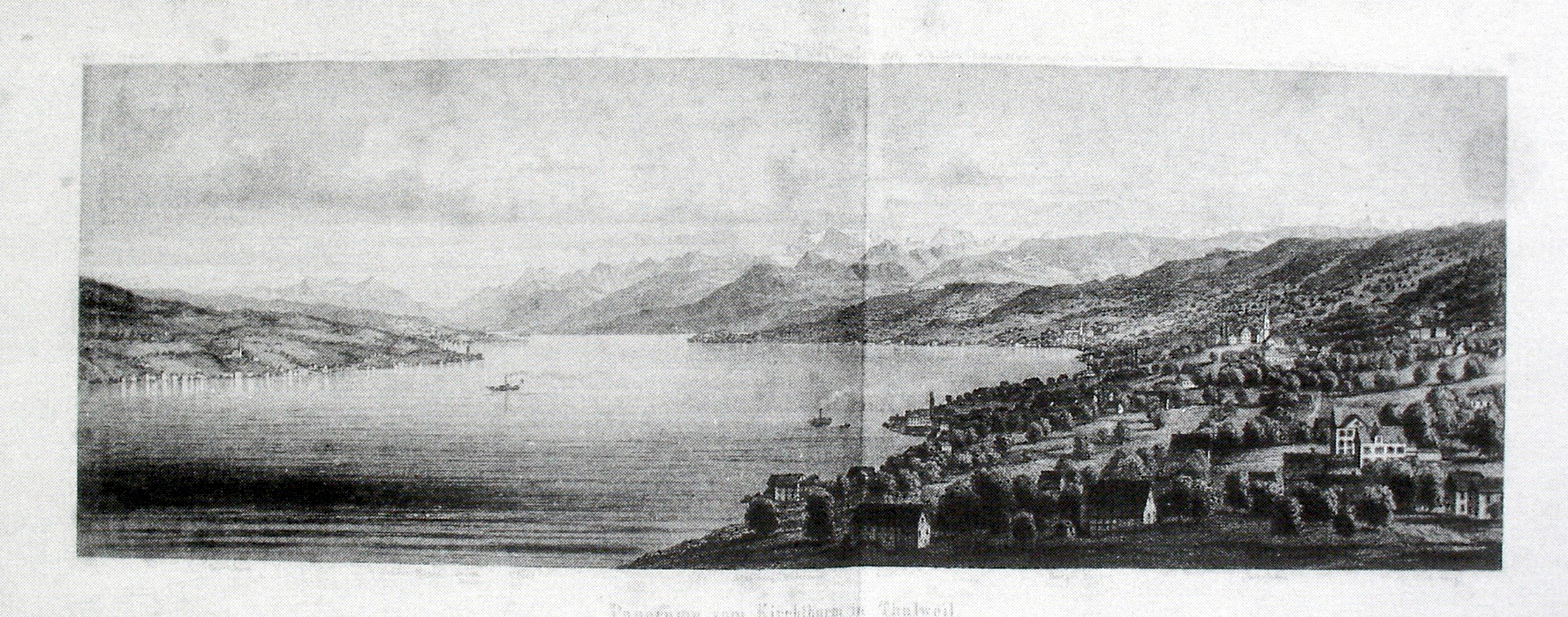 Panorama vom Kirchturm Thalwil von Rudolf Ringger um 1862